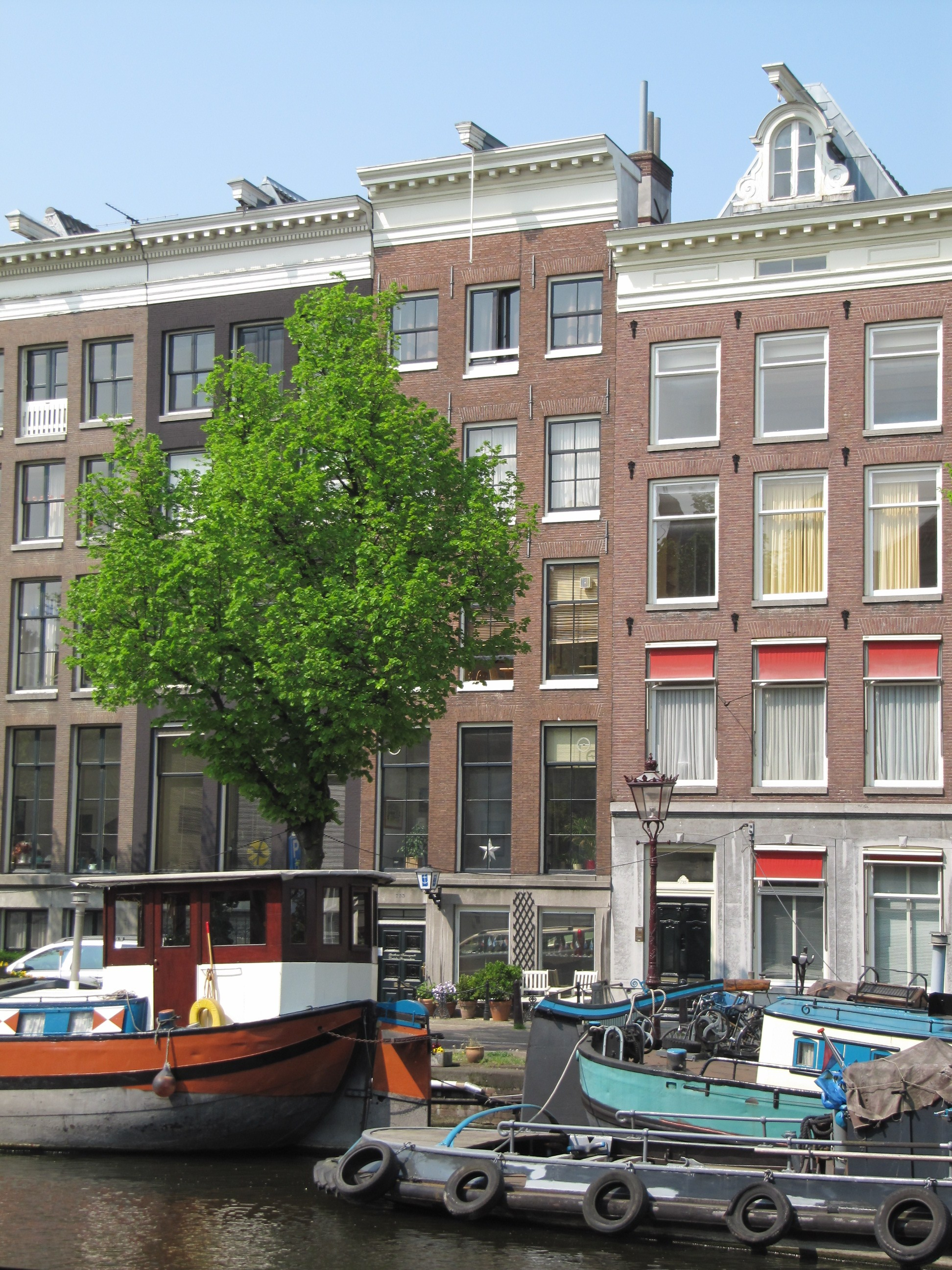 RM2432 Amsterdam - Keizersgracht 733.jpg Stichting Deutsches Seemannsheim Amsterdam[1]